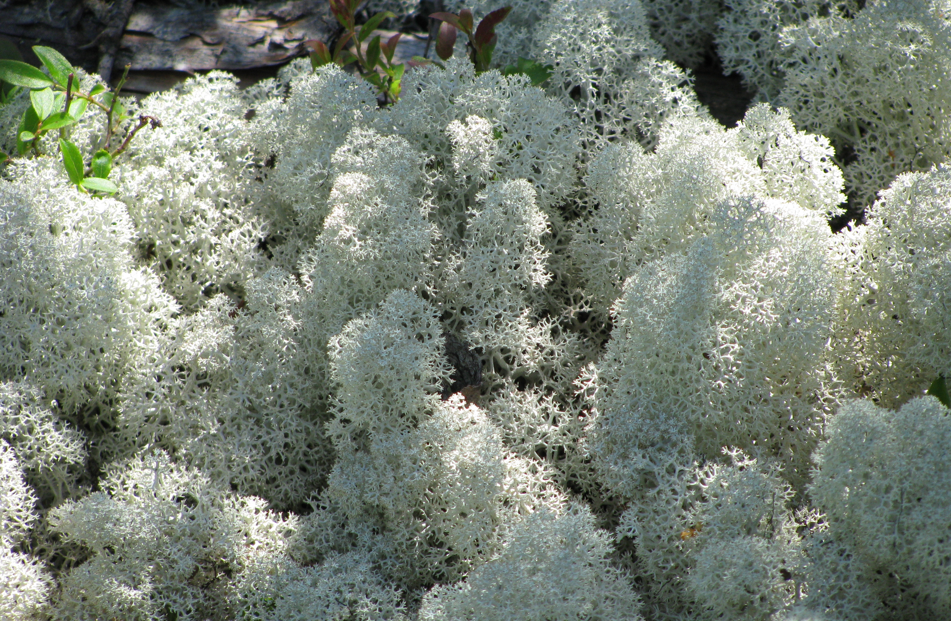 Cladonia stellaris, cladonie étoilée, lichen à caribou. Parc national des Grands-Jardins, Québec, Canada